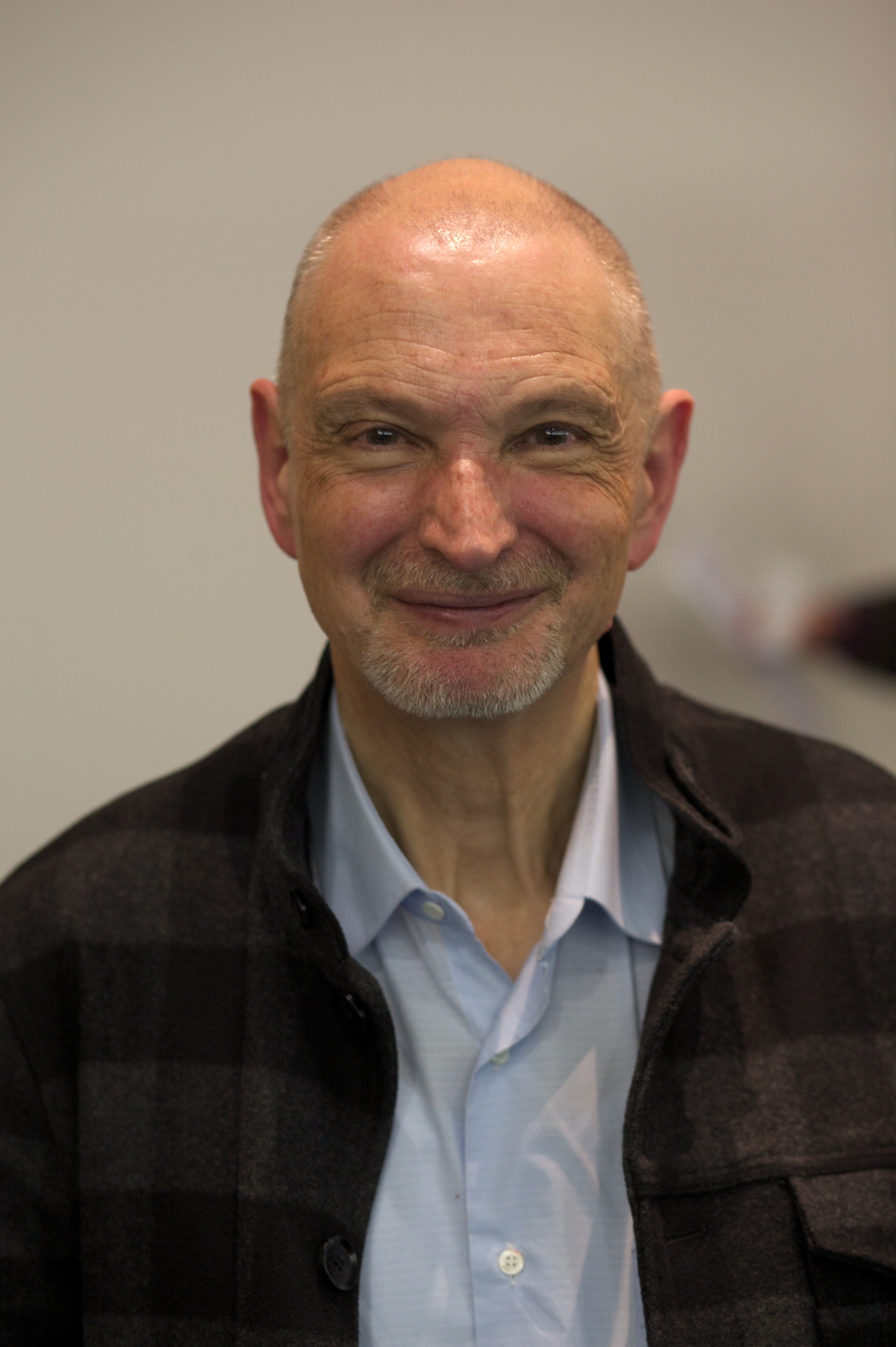 Serge Tisseron le 4-12-2013 Conférence « Apprivoiser les écrans » organisée pendant les « coulisses du jeu vidéo » par les bibliothèques municipales de Grenoble.